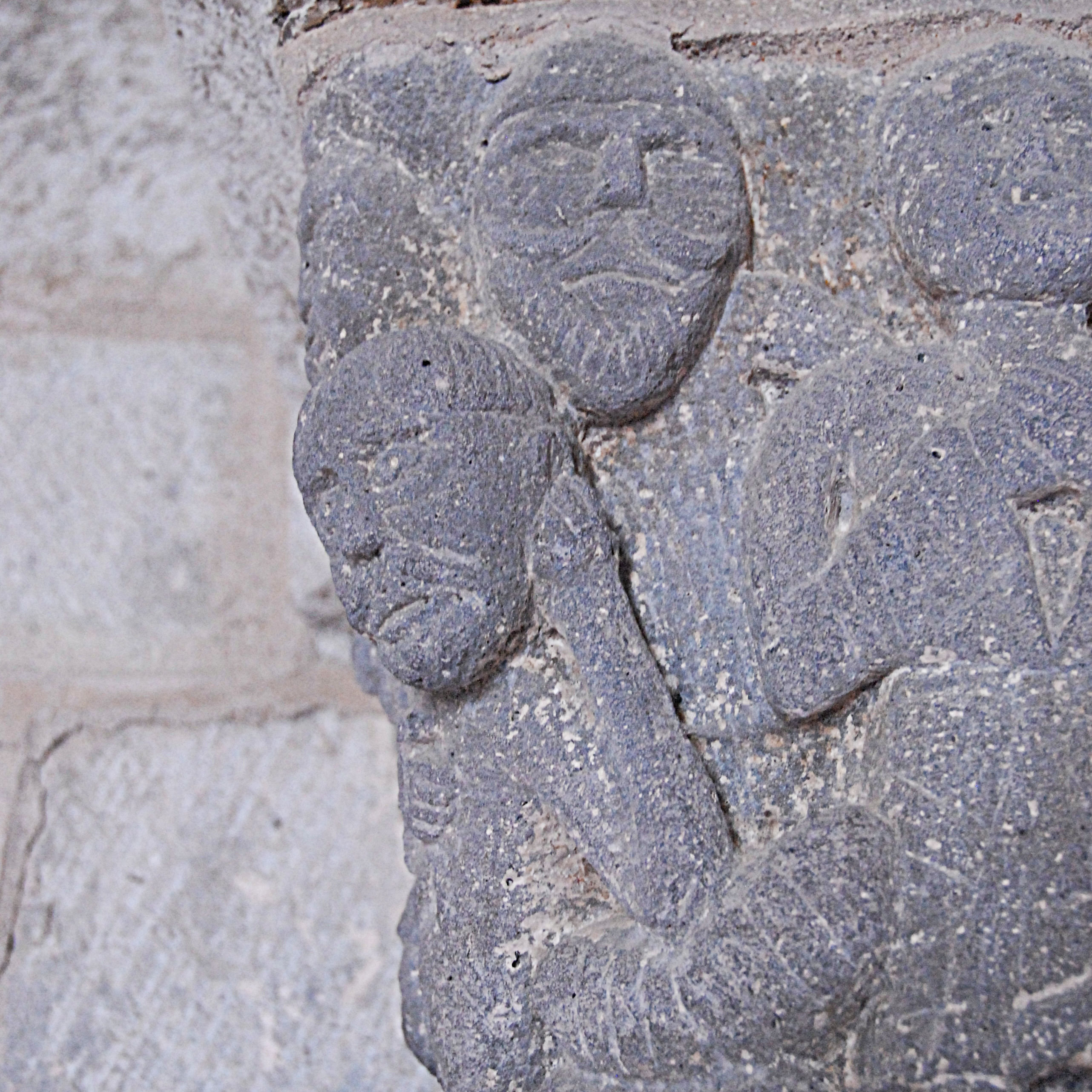 Chambon-sur-Lac, Friedhofskapelle, Kapitell,9 Männer, Detail halblinks